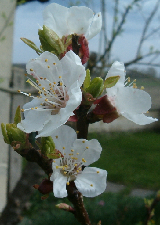 Aprikosenblüte / Marillenblüte